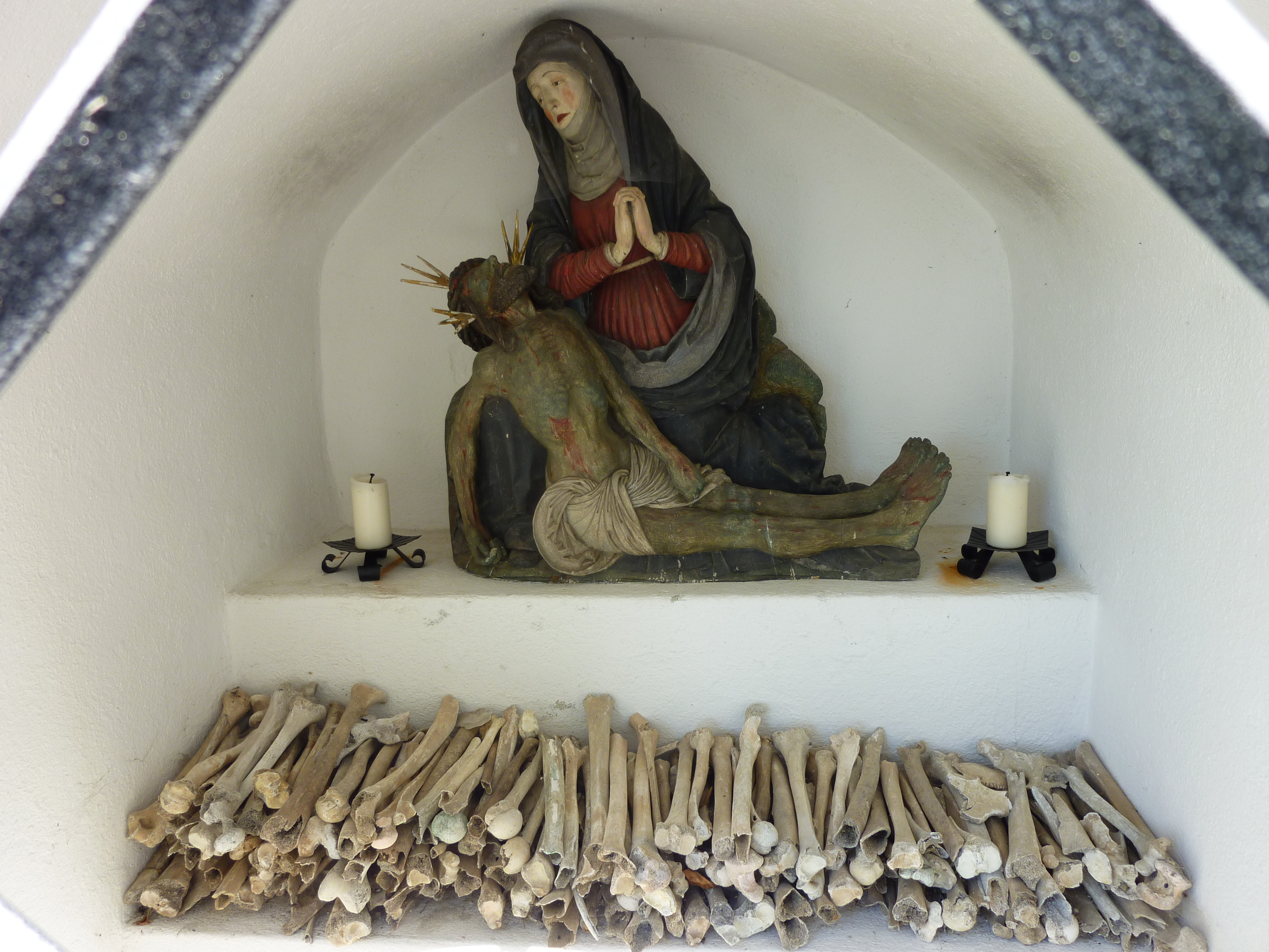 Schlachtkapelle Sempach: Beinhaus